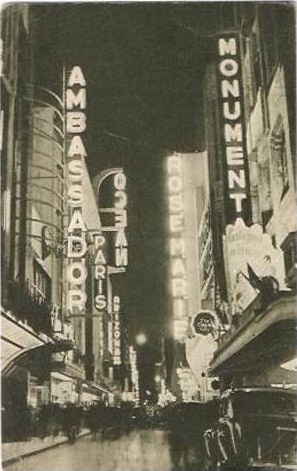 Vista nocturna de la calle Lavalle en Buenos Aires, con los carteles luminosos de los cines en su mejor época. Aparcados, autos característicos de los años '40.